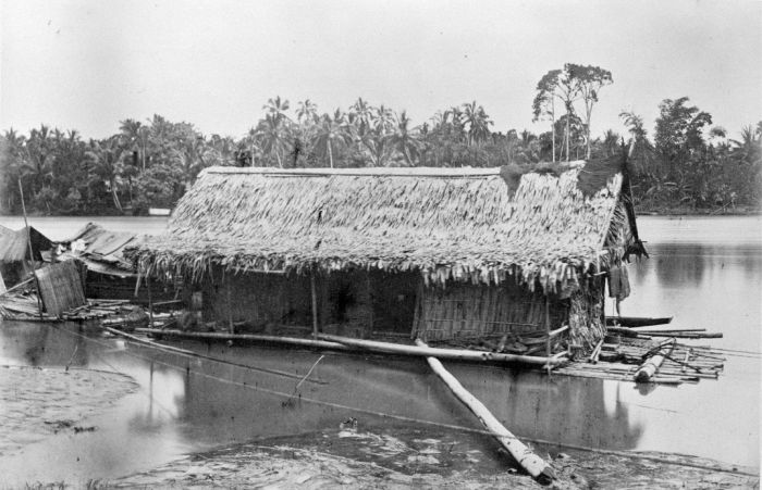 Foto. Deze foto is gemaakt tijdens de Sumatra Expeditie van 1877-1879. Landschappen uit de afdeeling Rawas.. Woonboot op de Batang Rawas, district Rawas, Sumatra